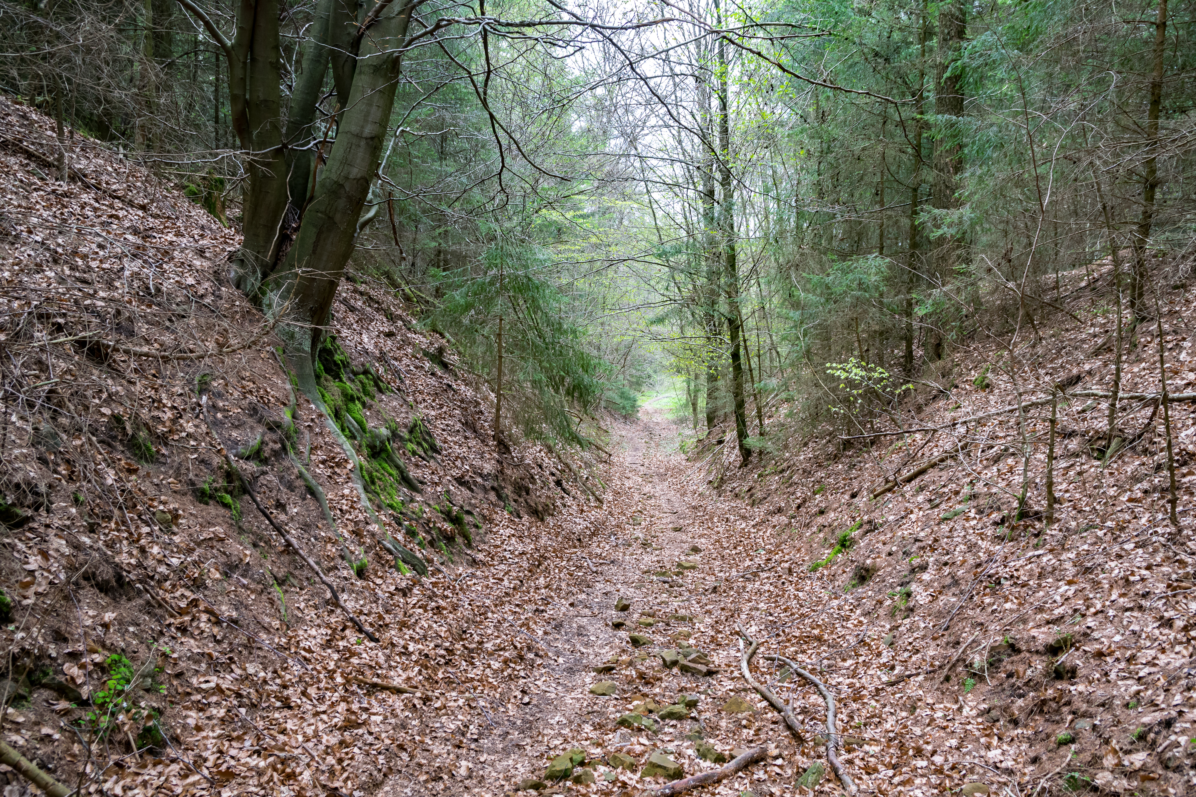 Wistinghauser Schlucht zwischen Toensberg und Hunneckenkammer, Oerlinghausen, Kreis Lippe.